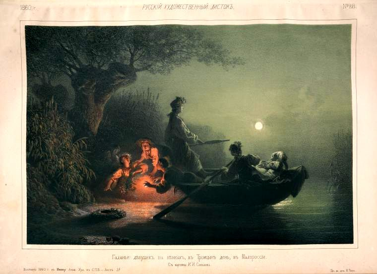 Гадание девушек в Троицын день. "Русский художественный листок", 1860.